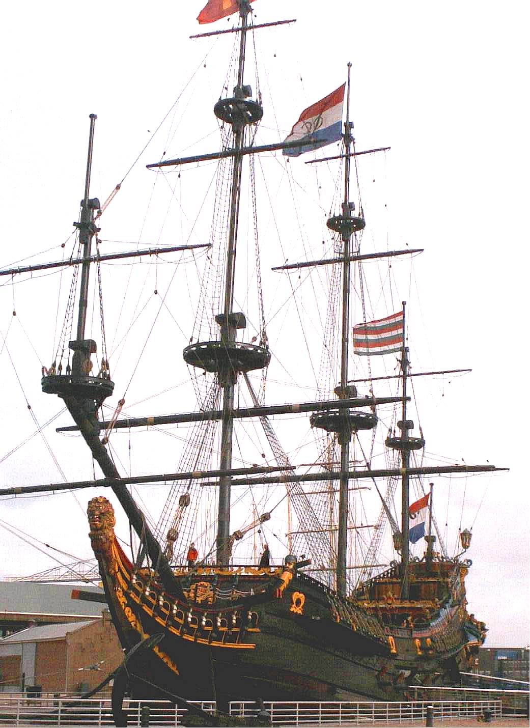 Prins Willem - originaler Nachbau des Flaggschiffs der niederländischen Vereinigten Ostindien Company (VOC) aus dem 17. Jahrhundert im Cape Holland Treasure Park von Den Helder; 2009 vollständig durch Brand zerstört.